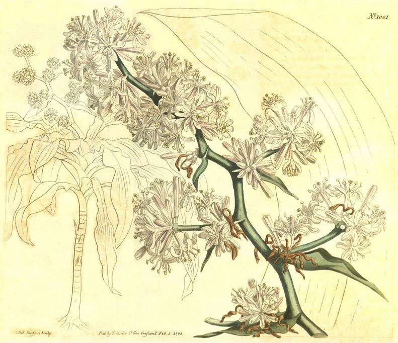 Dracaena fragrans, Sweet-Scent Dracaena